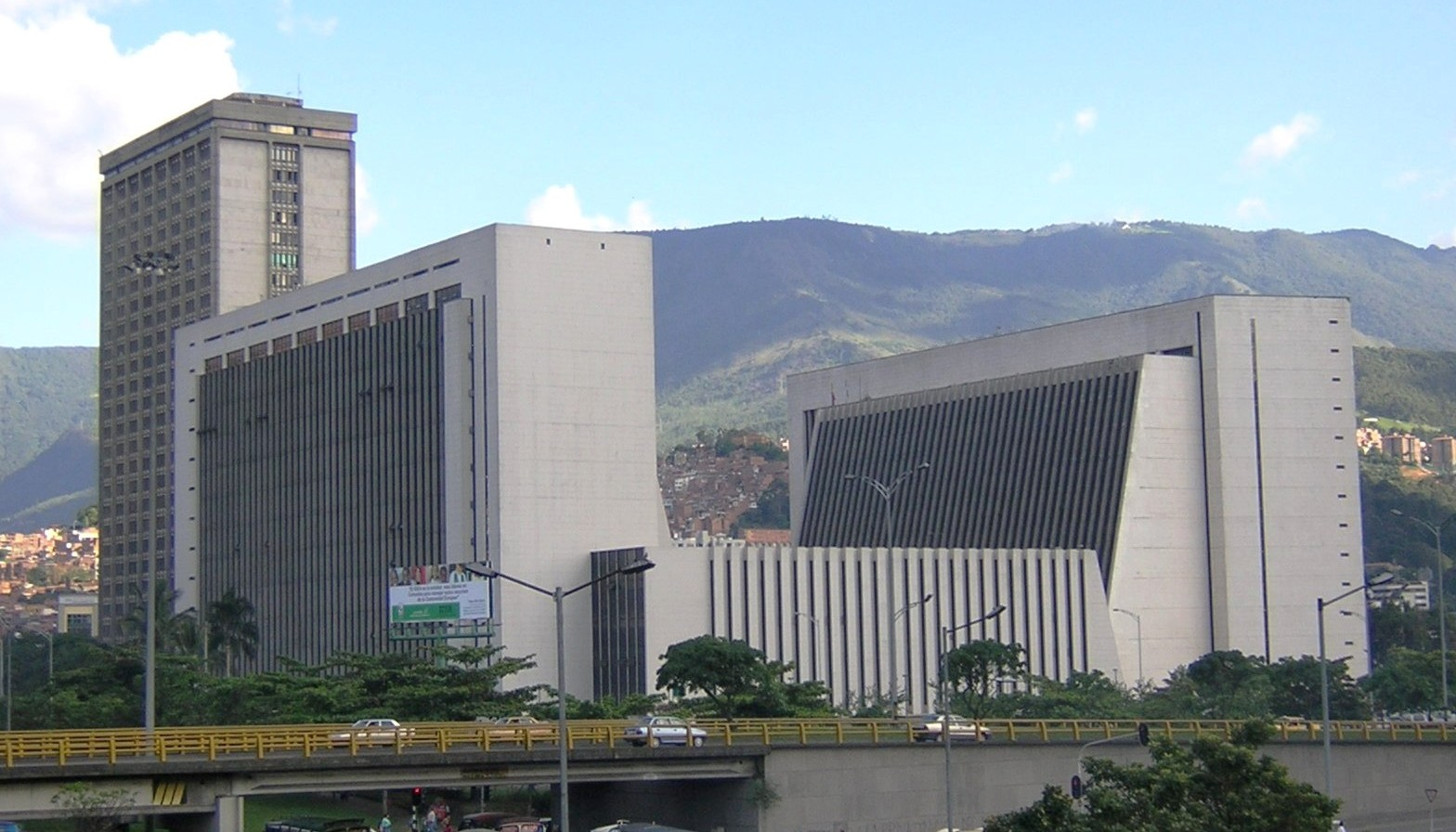 Centro Administrativo La Alpujarra, Medellín, Colombia. Municipal and Regional public office buildings.